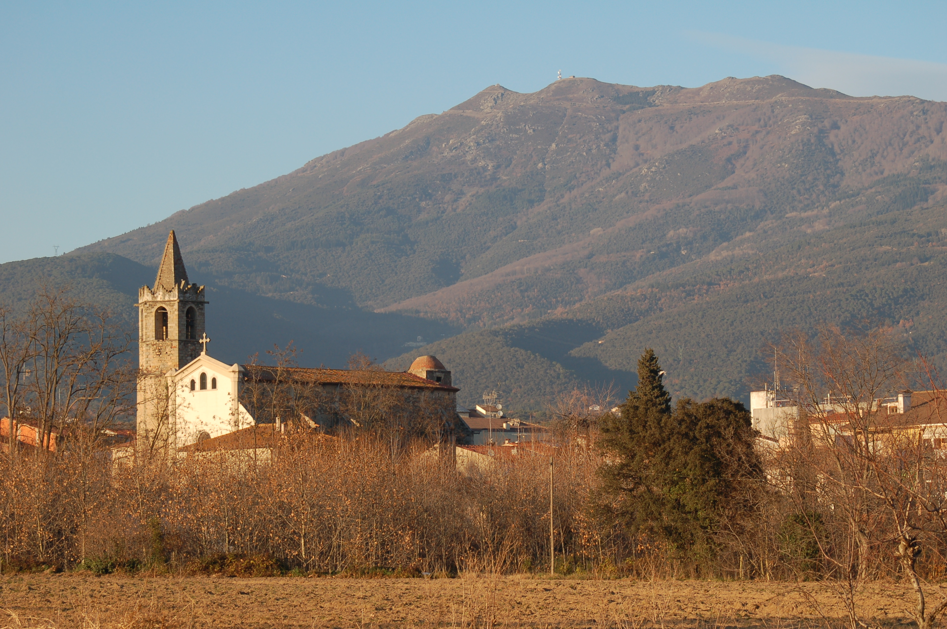 Esglèsia de Santa Maria de Palautordera amb el Montseny al darrera.